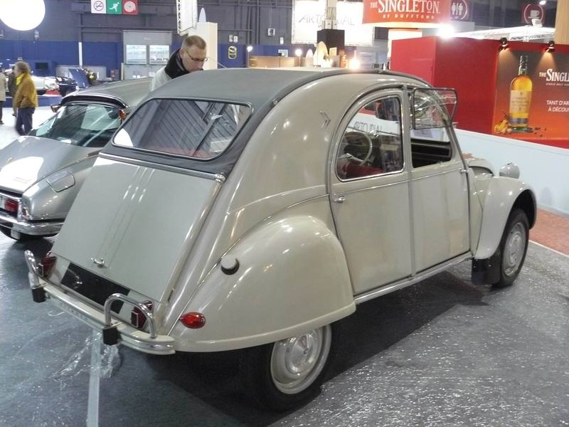 Retromobile 2012